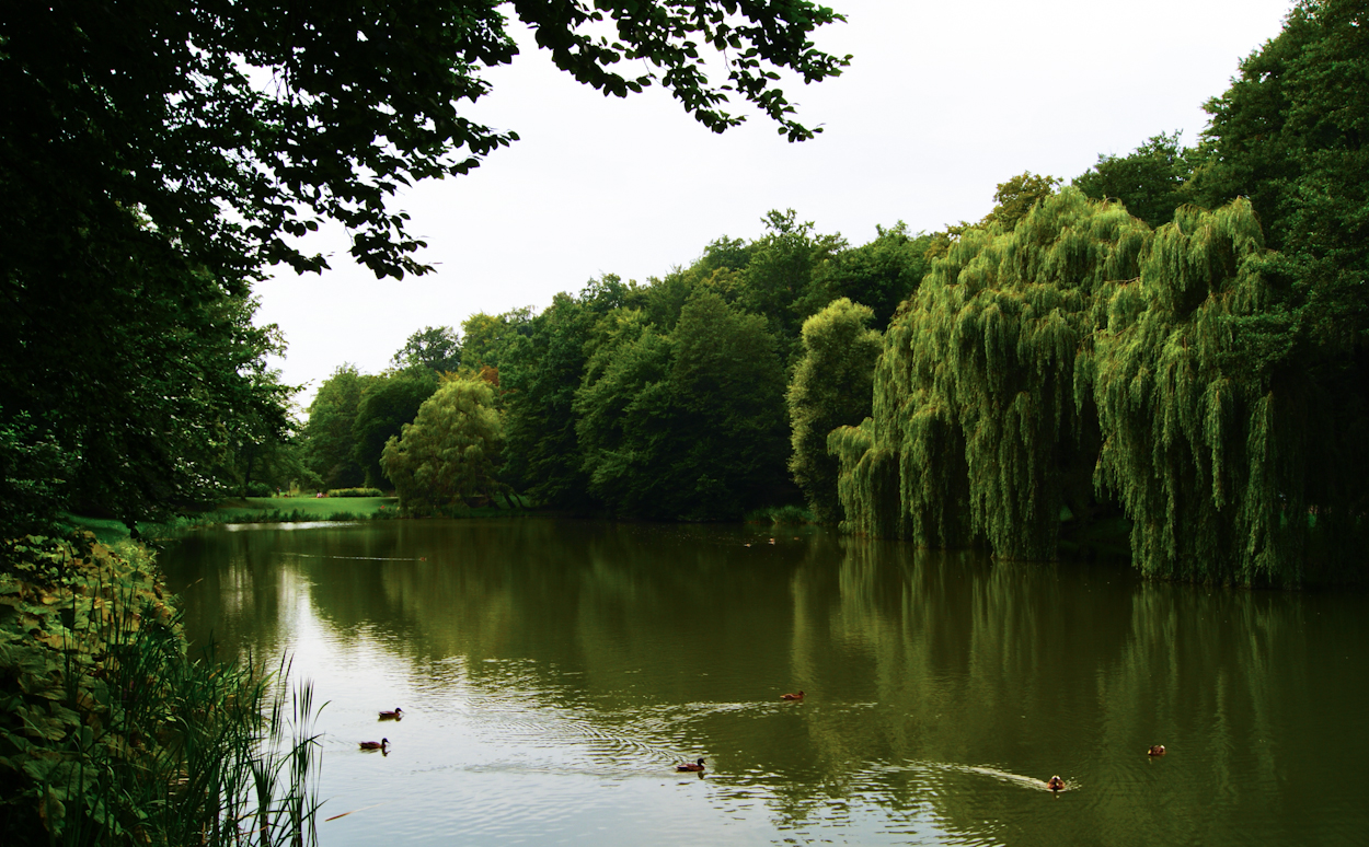 Gdańsk Orunia. Wyższy staw w Parku Oruńskim.